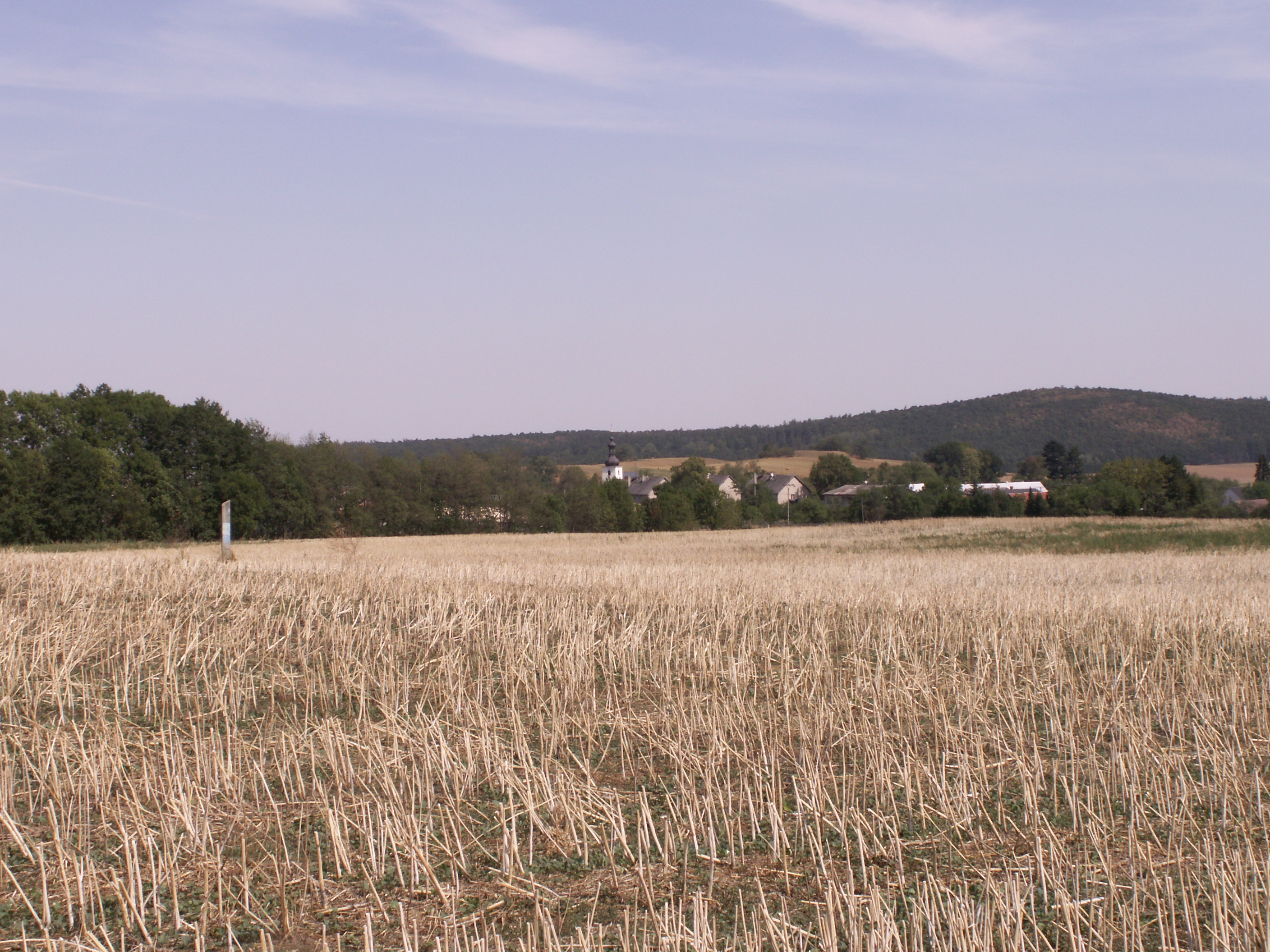 Vysoká, okres Bruntál, kraj Moravskoslezský, ze silnice č. 457 (od Jindřichova